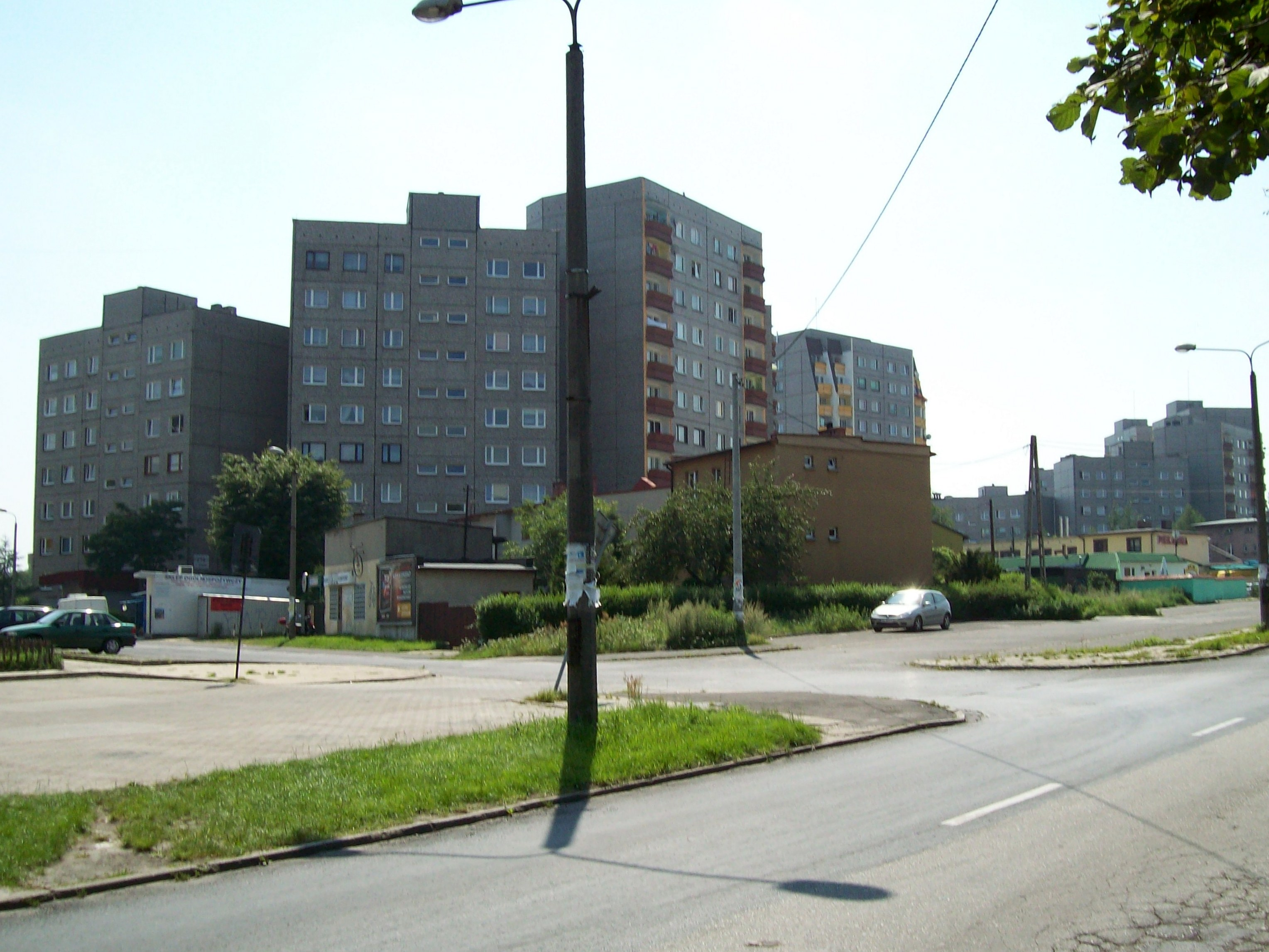 Osiedle Odrodzenia w Katowicach Piotrowicach